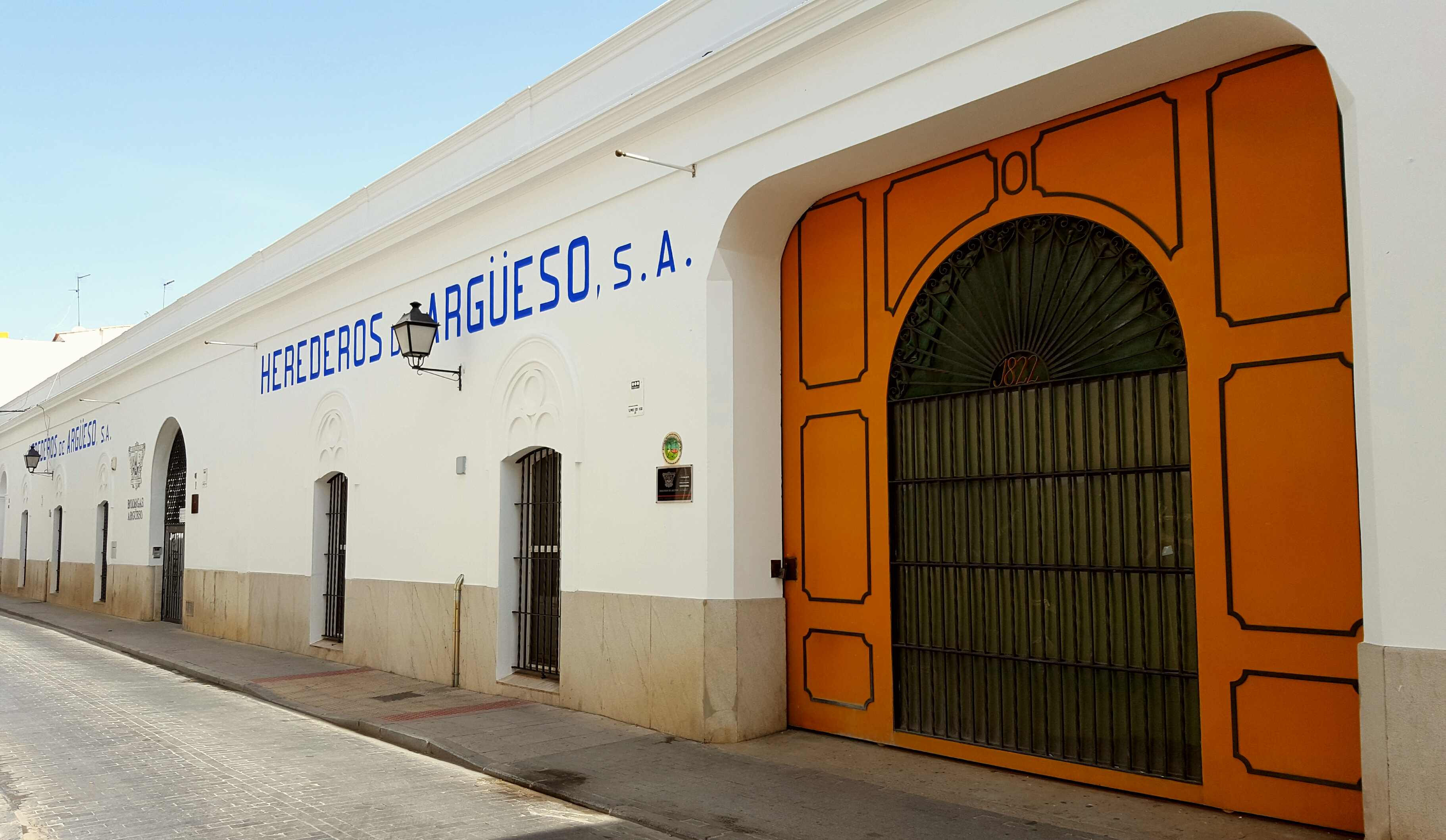 Fachada Calle Mar Bodegas Argüeso